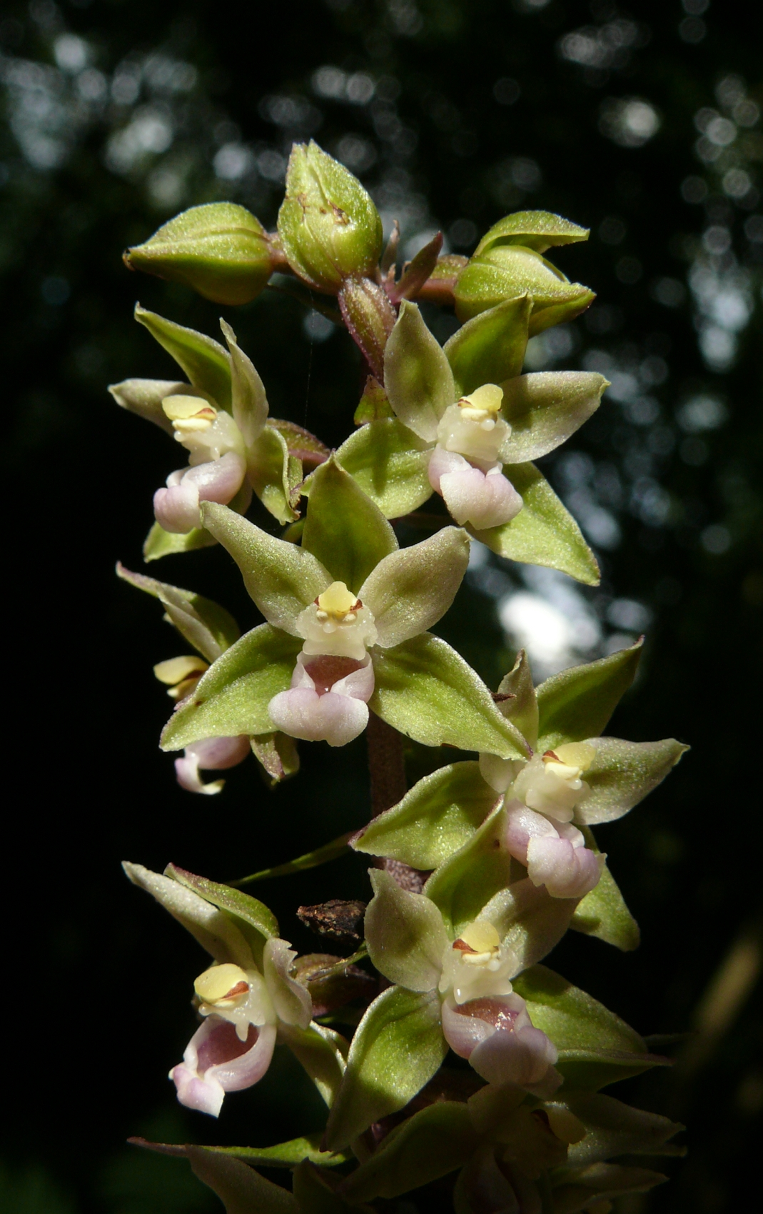 Epipactis purpurata, Schwäbisch-Fränkische Waldberge, Germany